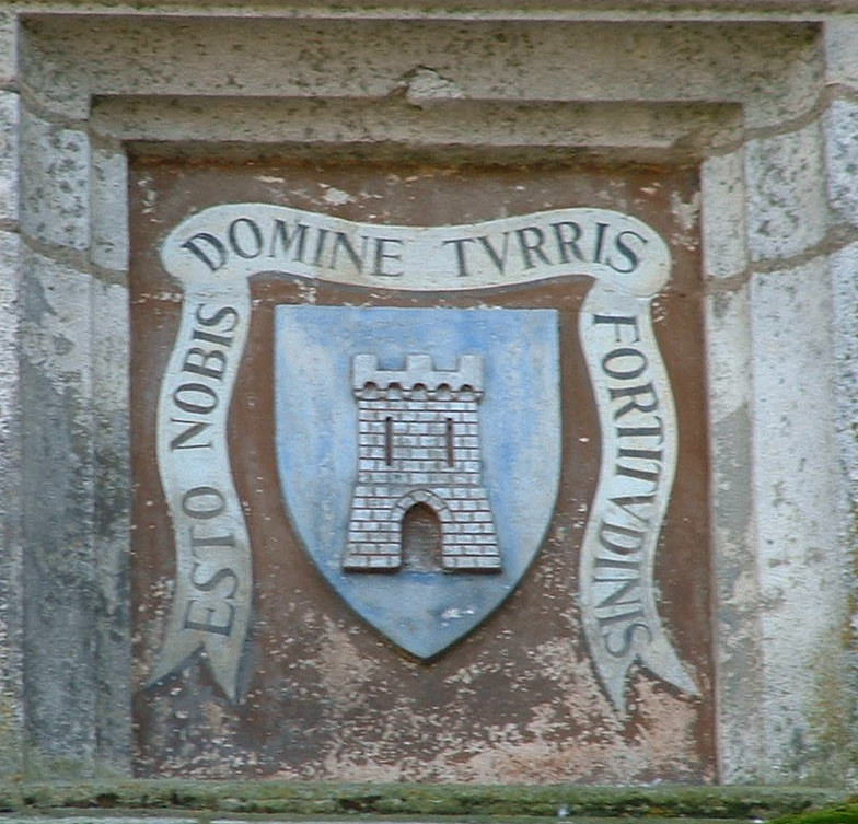 Avallon : Blason et devise de la ville